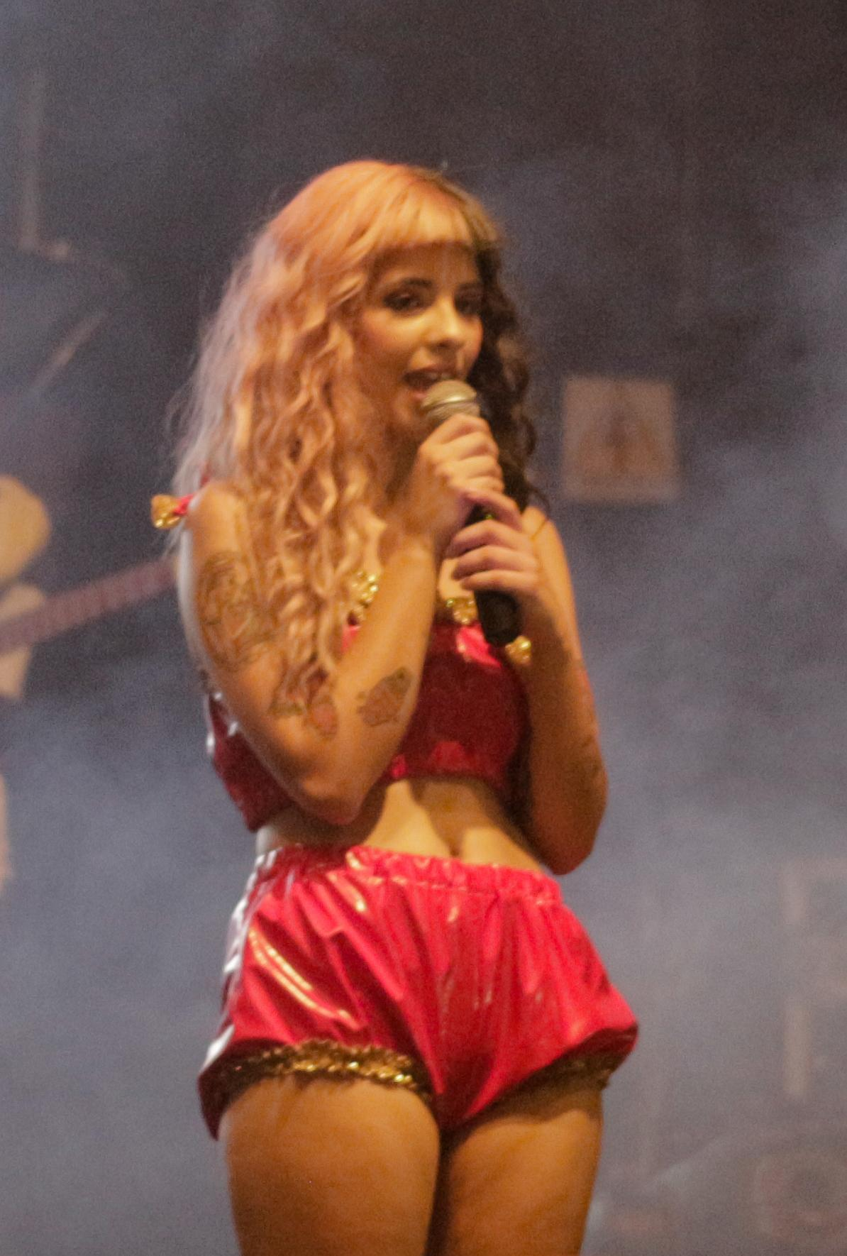 Melanie Martinez en el Carioca Club en São Paulo, Brasil.